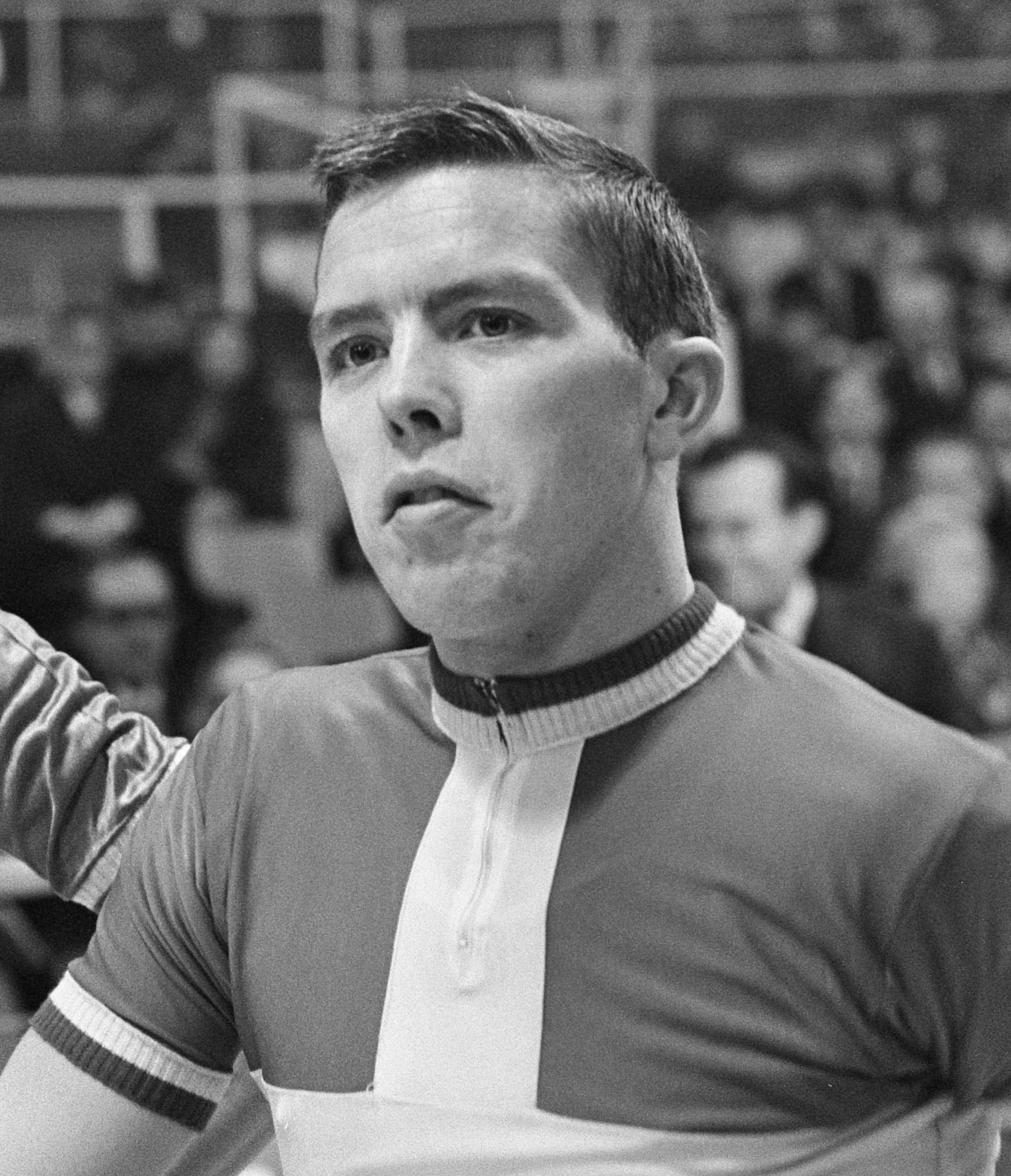 Zesdaagse in de RAI. Palle Lykke (Denemarken).